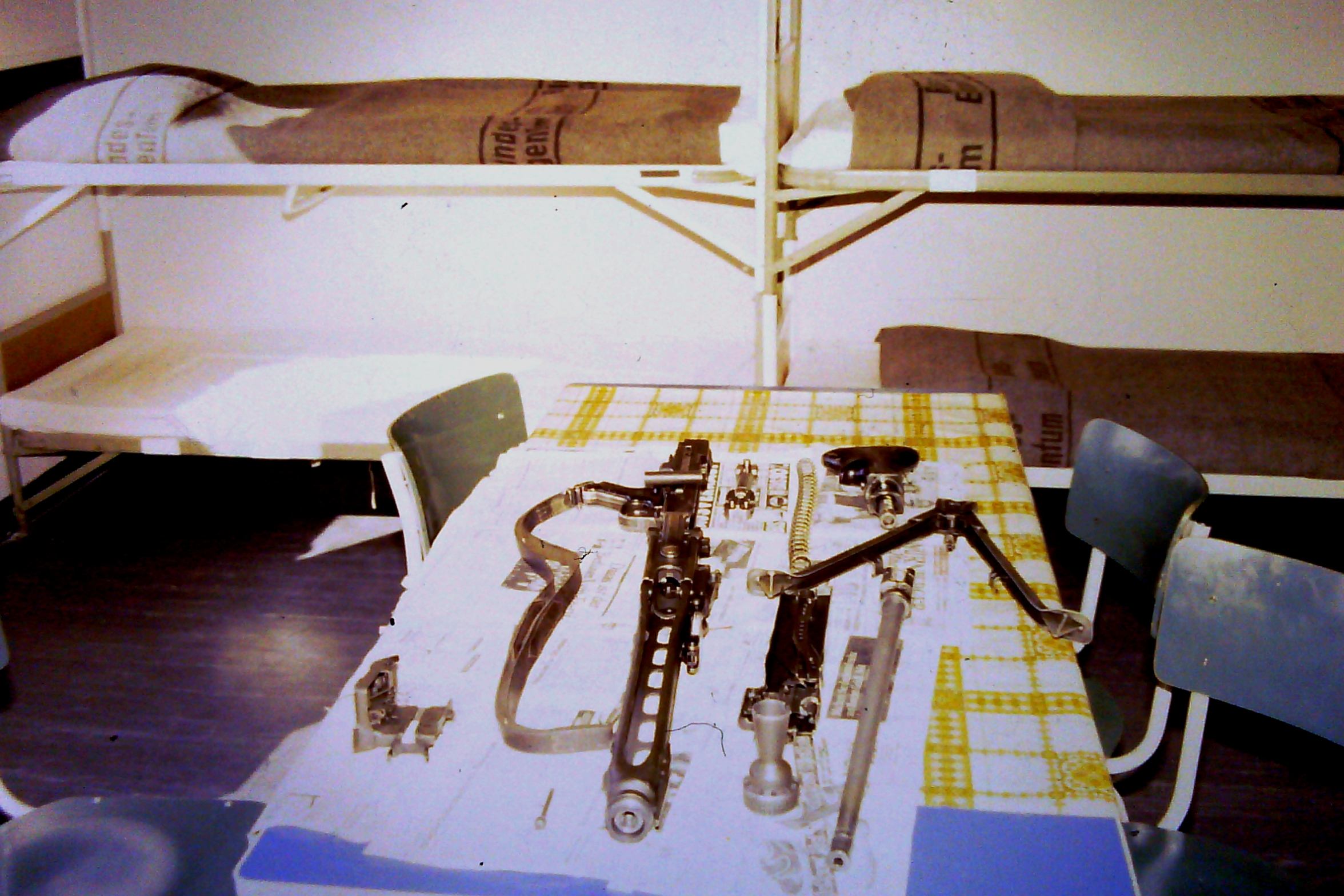 Stube der Bundeswehr im Jahr 1982. Auf dem Tisch ein zerlegtes MG3.